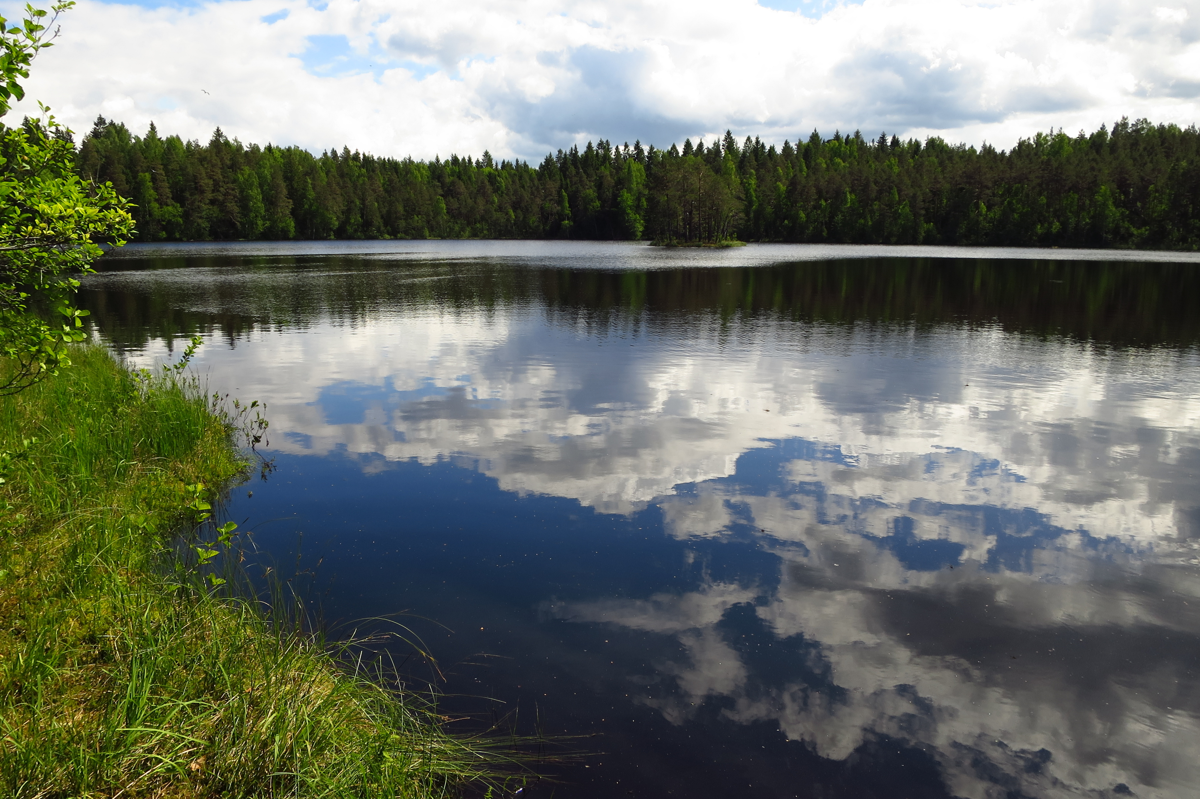 Kurtna Saarejärv Kurtna MKAl